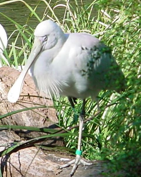 Platalea flavipes